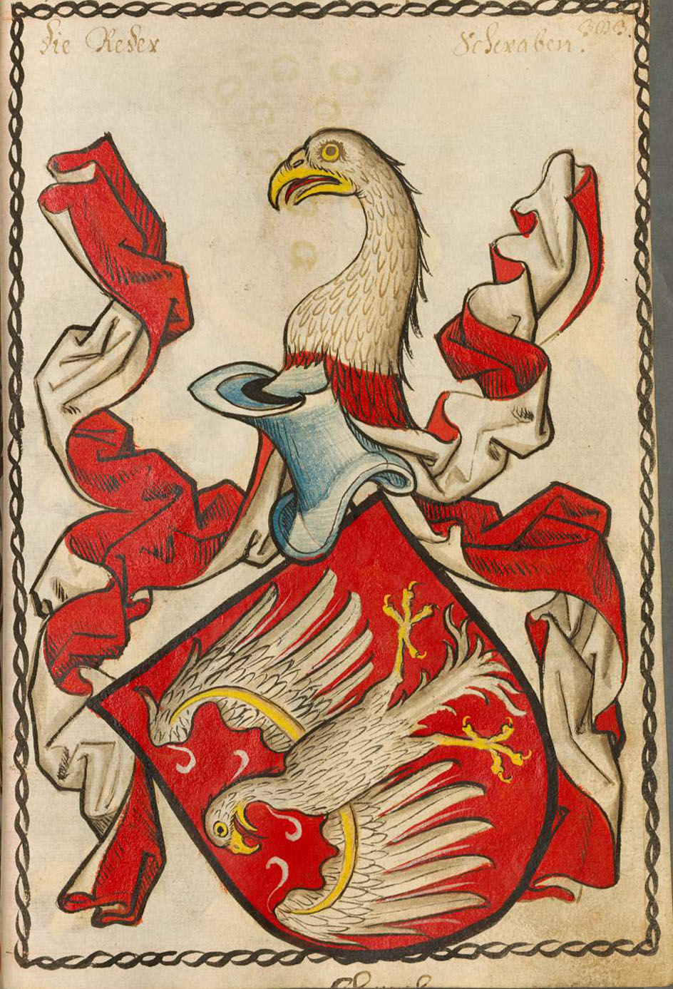 Scheibler'sches Wappenbuch, älterer Teil; Seite 383 Von Reder Schwaben